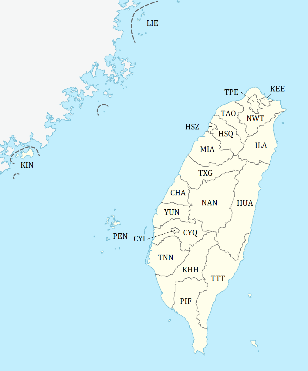 ISO 3166-2:TW:2015-11-27